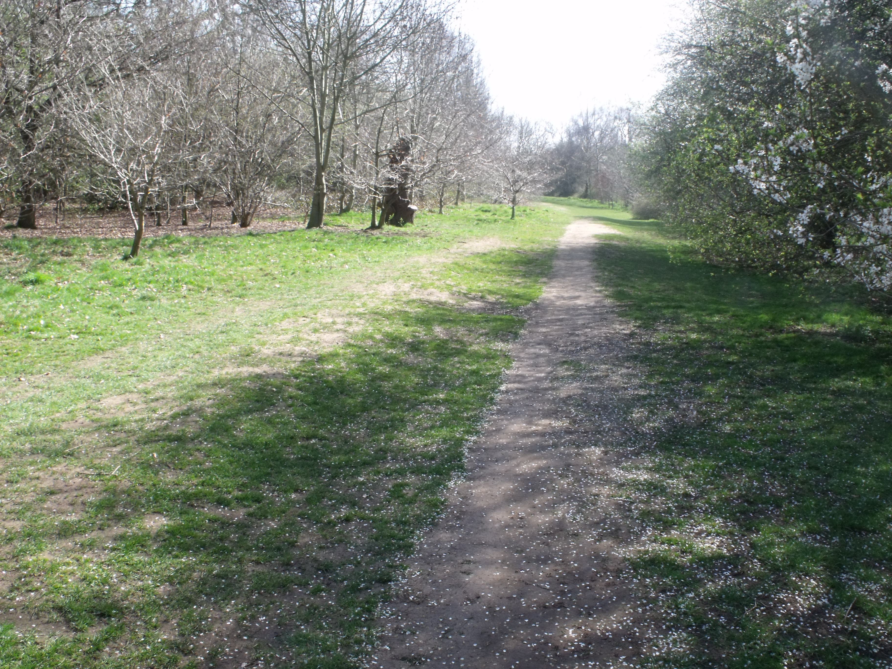 Vereda llamada The Dingles, en el parque rural de la Comarca (Hall Green, Birmingham).